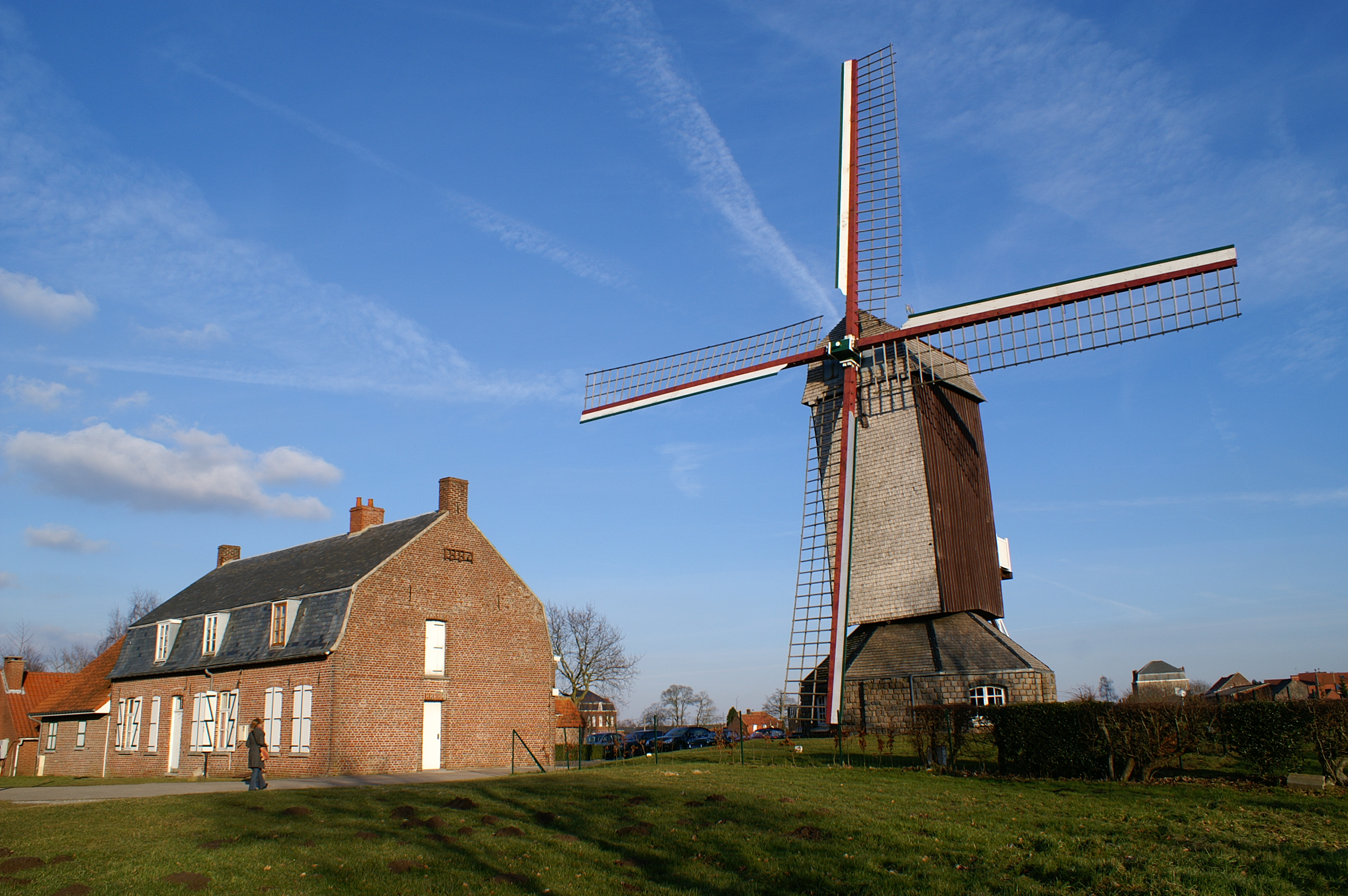 L'Ondankmeulen (le moulin de l’Ingratitude) et l’arrière de l’estaminet «De Vierpot» (le pot à braise) à Boeschepe (Nord, France).